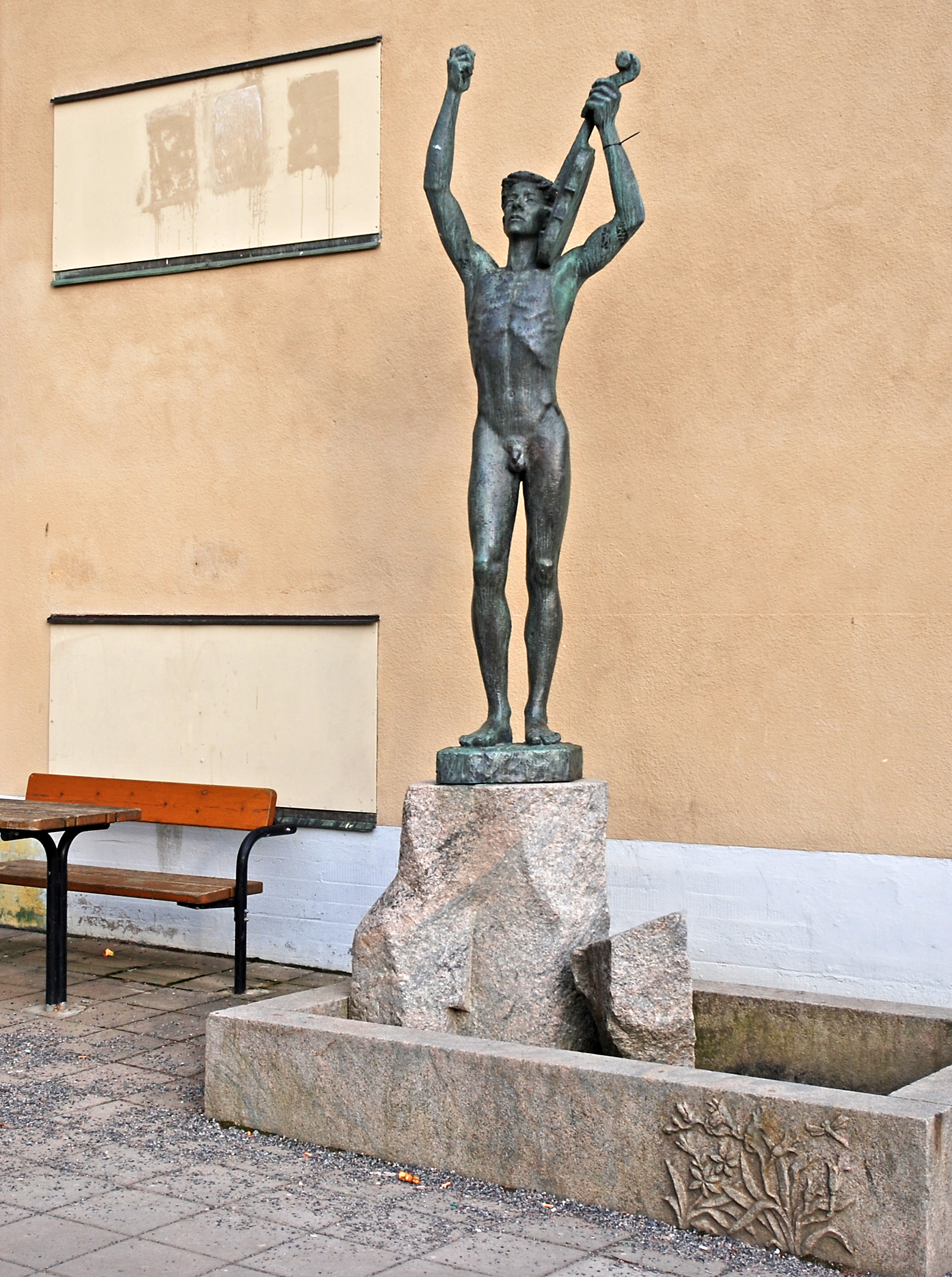 Folkvisan, skulptur av Eric Grate, vid Bromma Gymnasium, Stockholm